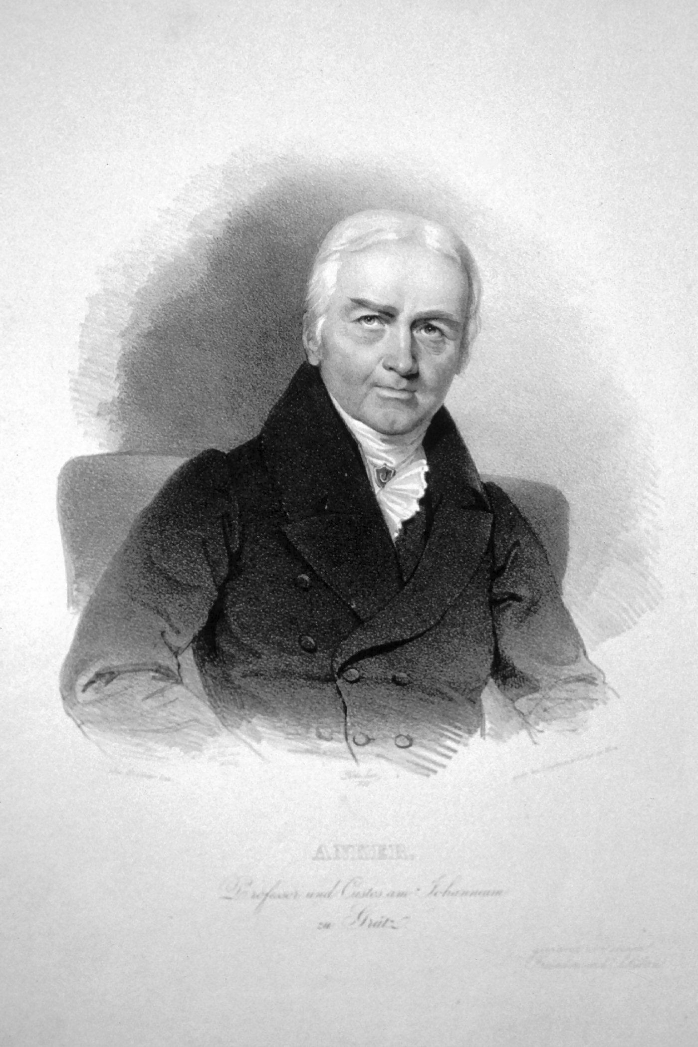 Matthias Anker, Lithographie von Josef Kriehuber nach Josef Eduard Teltscher, 1835